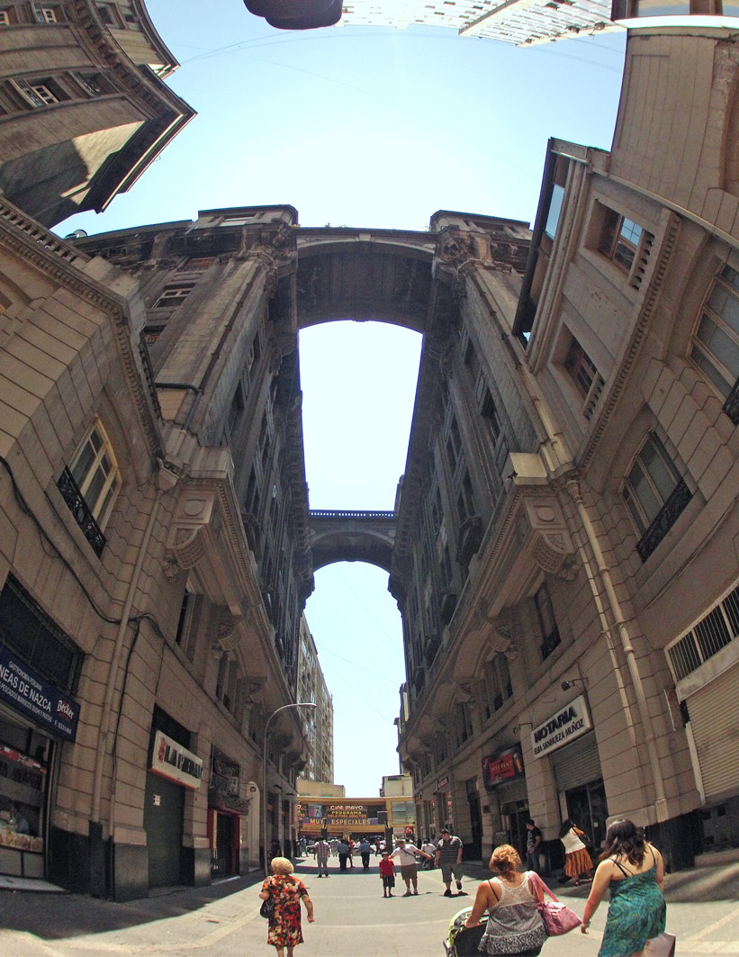 500px provided description: fot?grafo: Jorge Godoy Guerra [#santiago ,#chile]